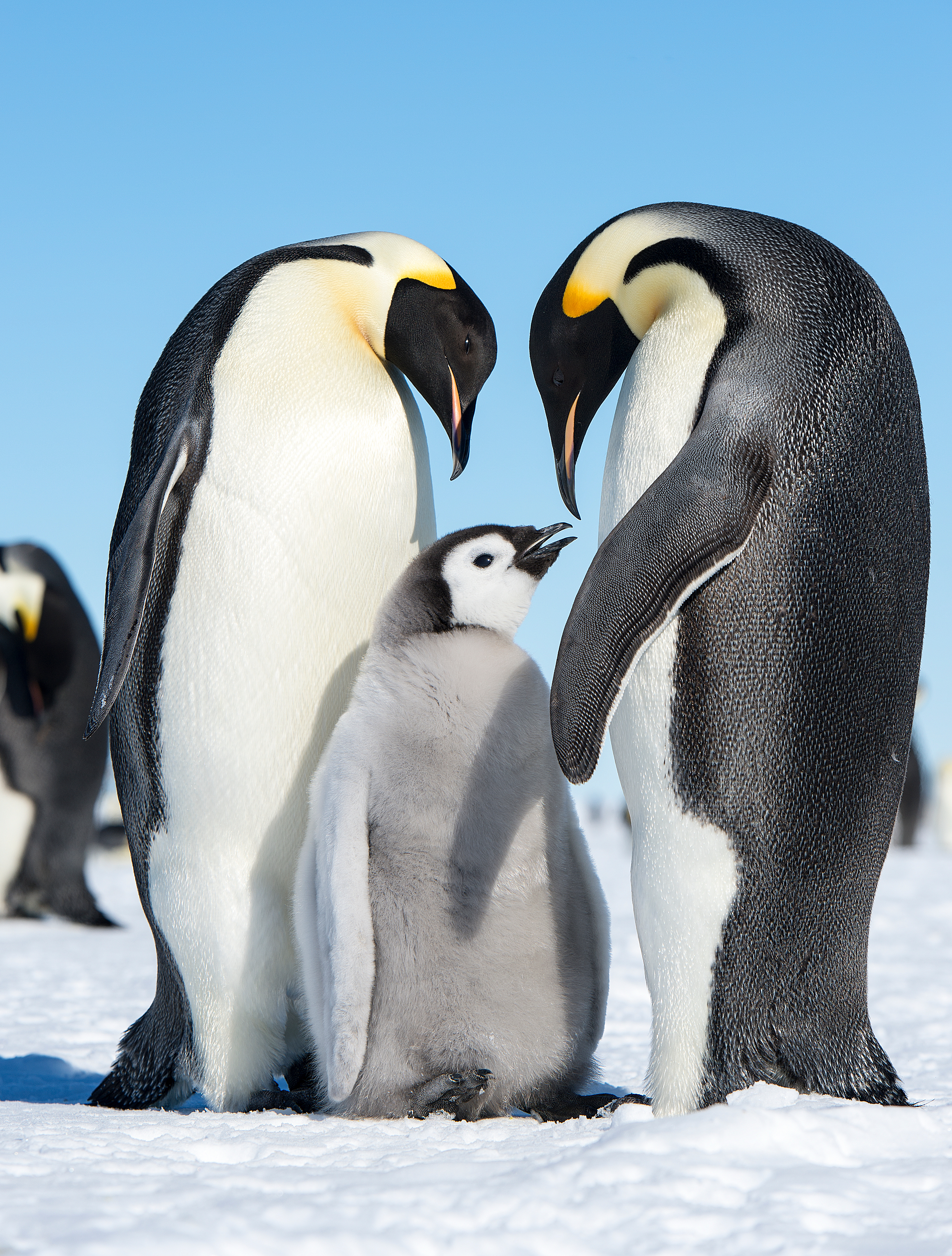 Emperor Penguins